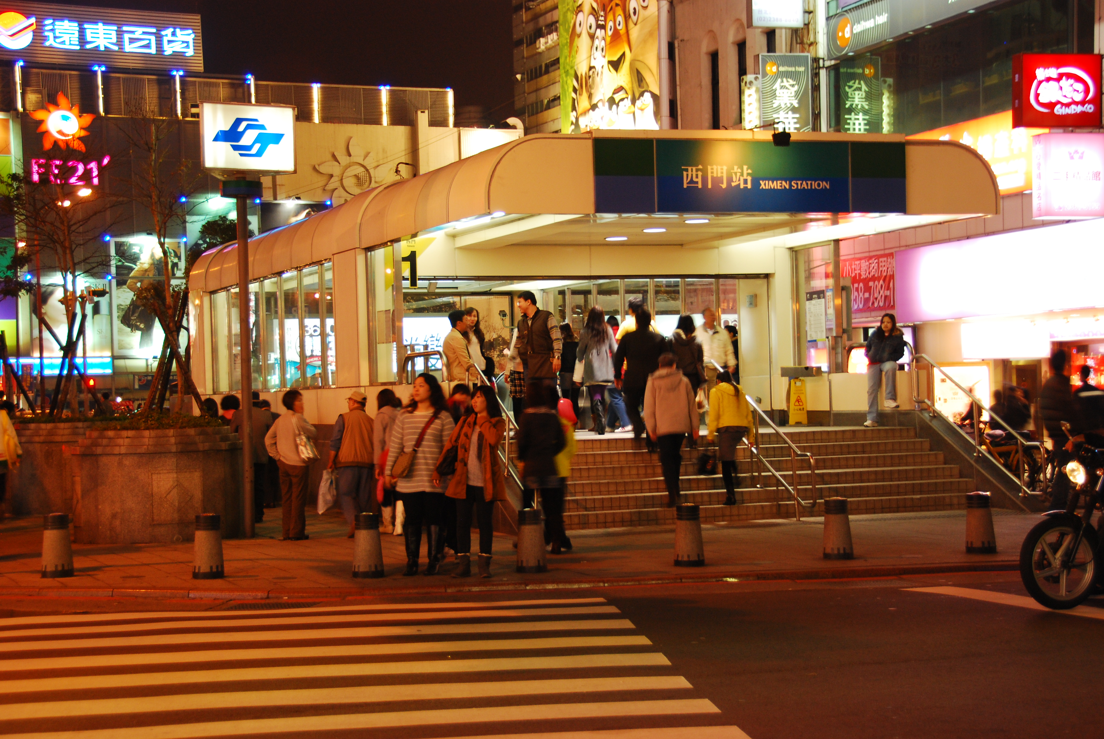 中文（台灣）: 台北捷運西門站一號出口夜景。